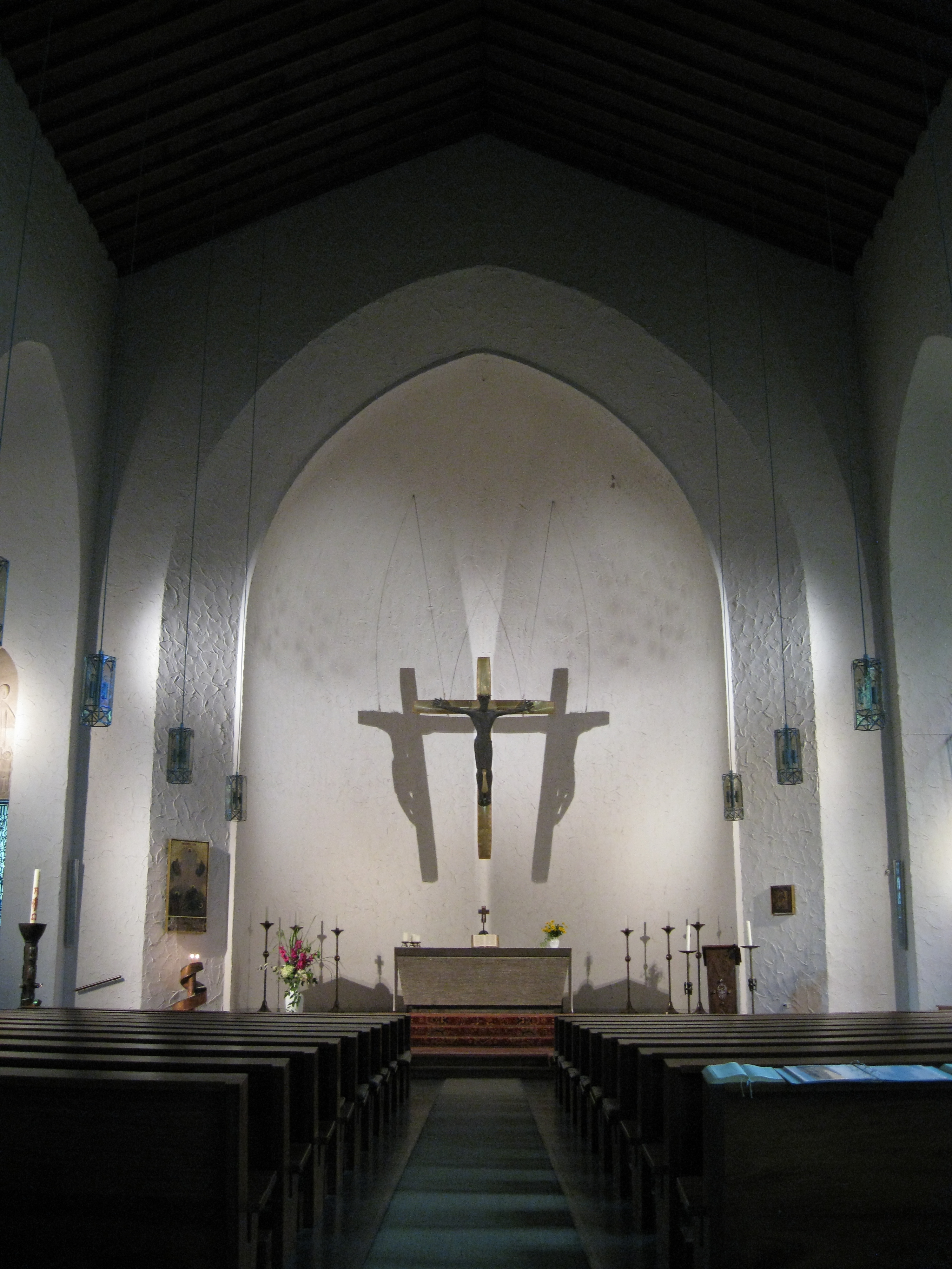 Altar der Kirche zum Heilsbronnen